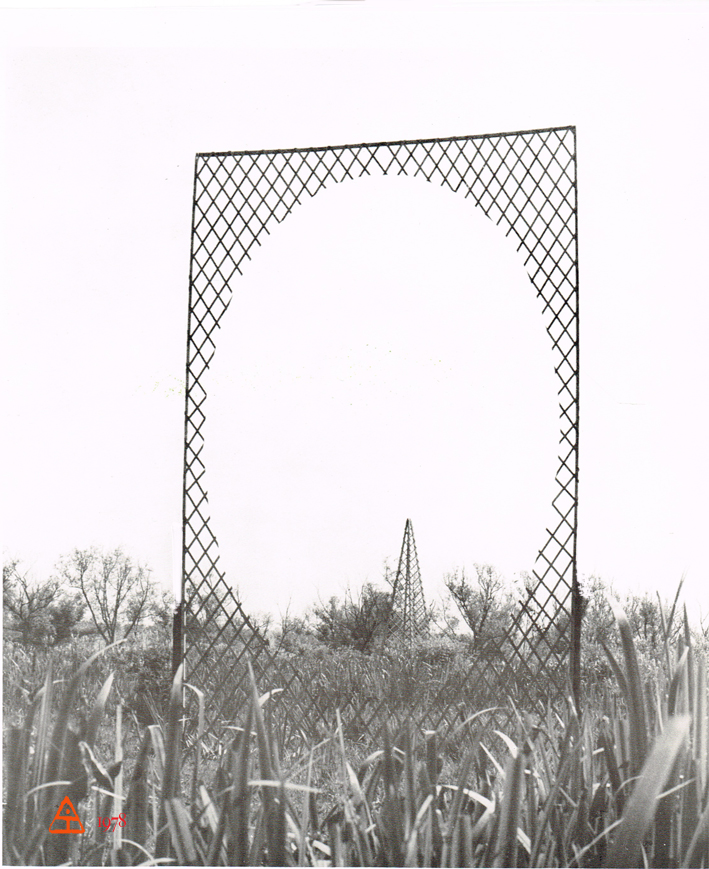 Symposium Sculpture-Nature Bordeaux 1978, Photographie de l'installation de Jean-Max Albert